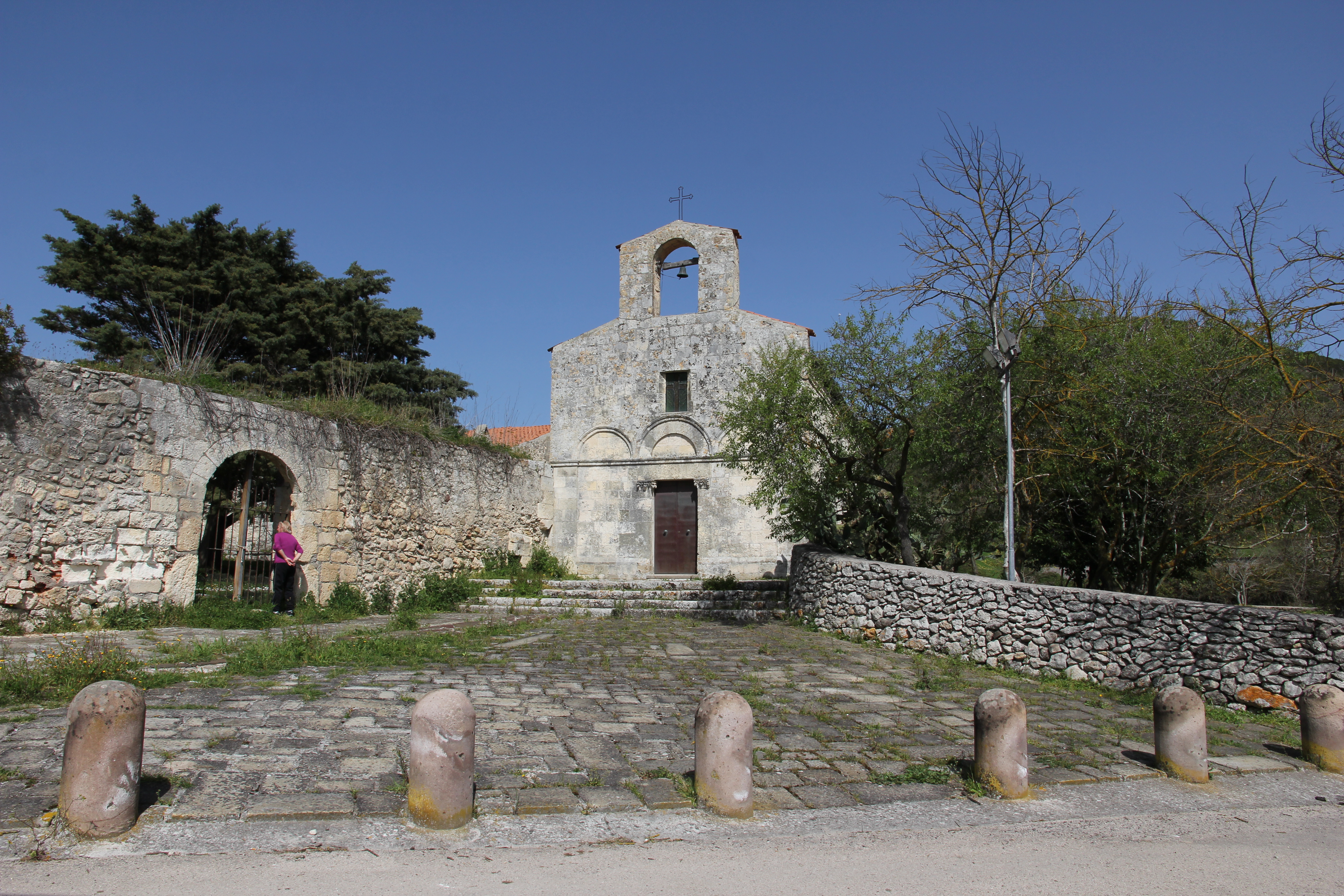 Banari - Chiesa di Santa Maria di Cea